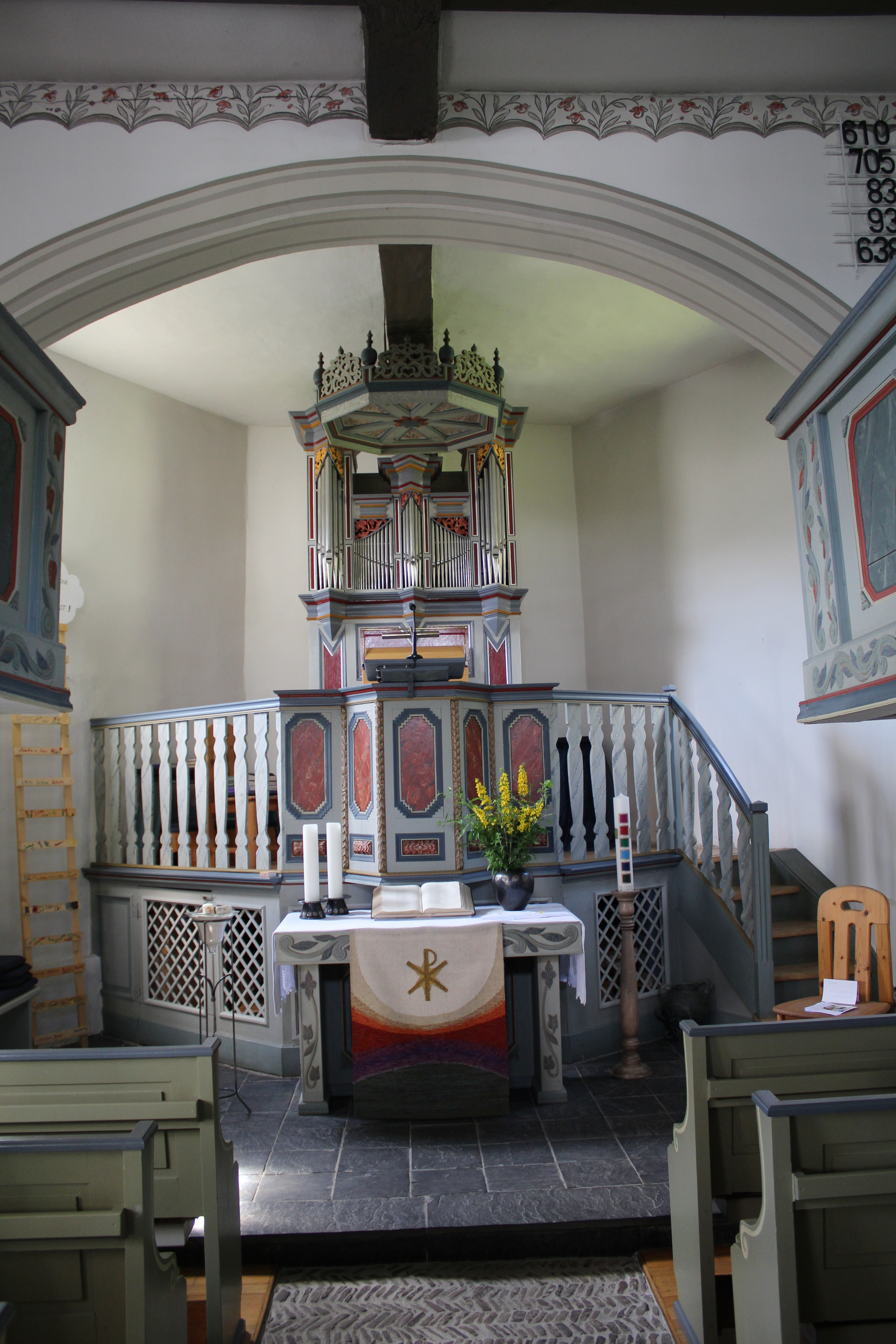 Ev. Kapelle Steinbrücken, Gemeinde Dietzhölztal, Hessen, Deutschland